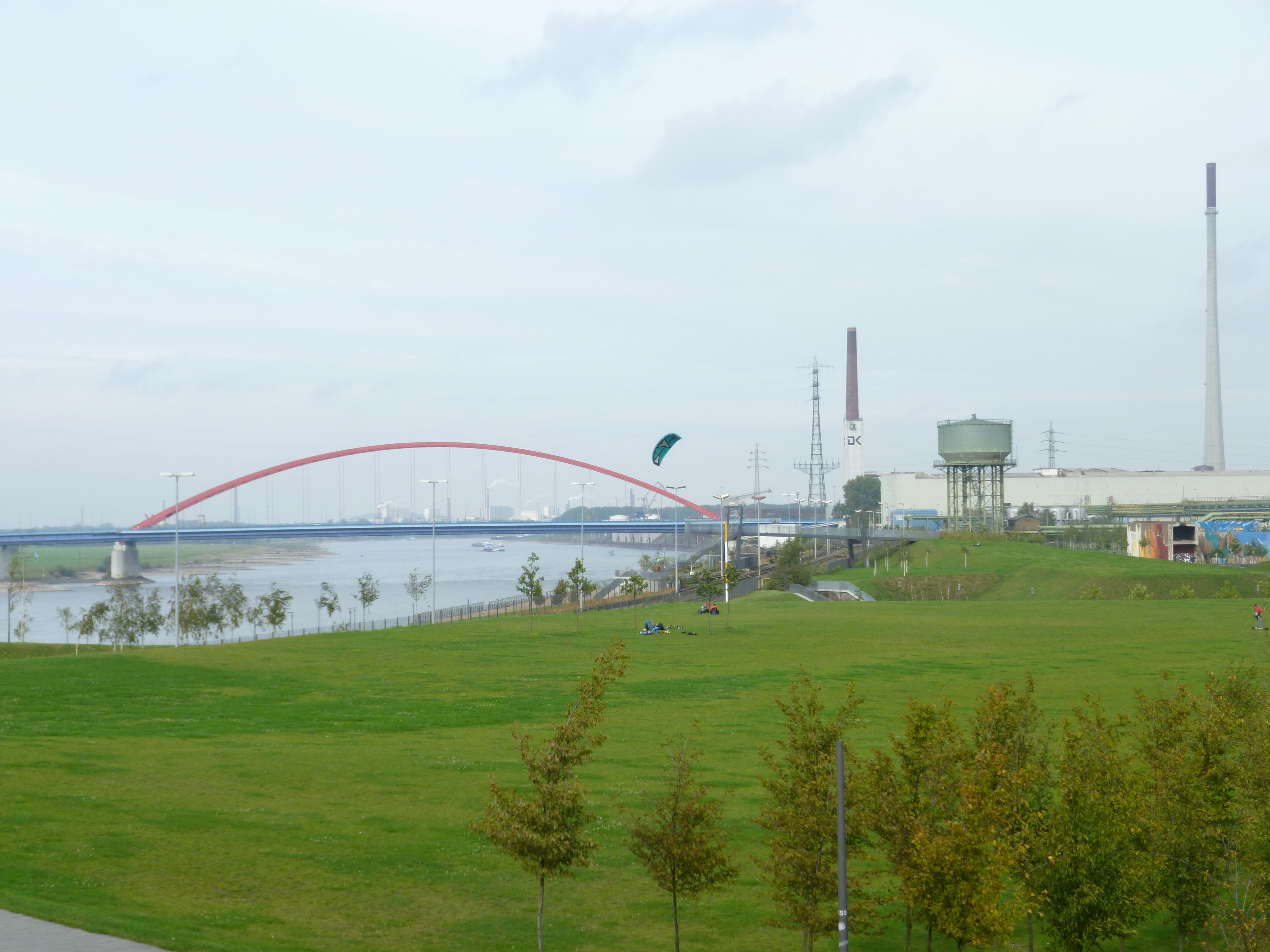 Rheinuferpark Duisburg-Wanheimerort (im Hintergrund Brücke der Solidarität)